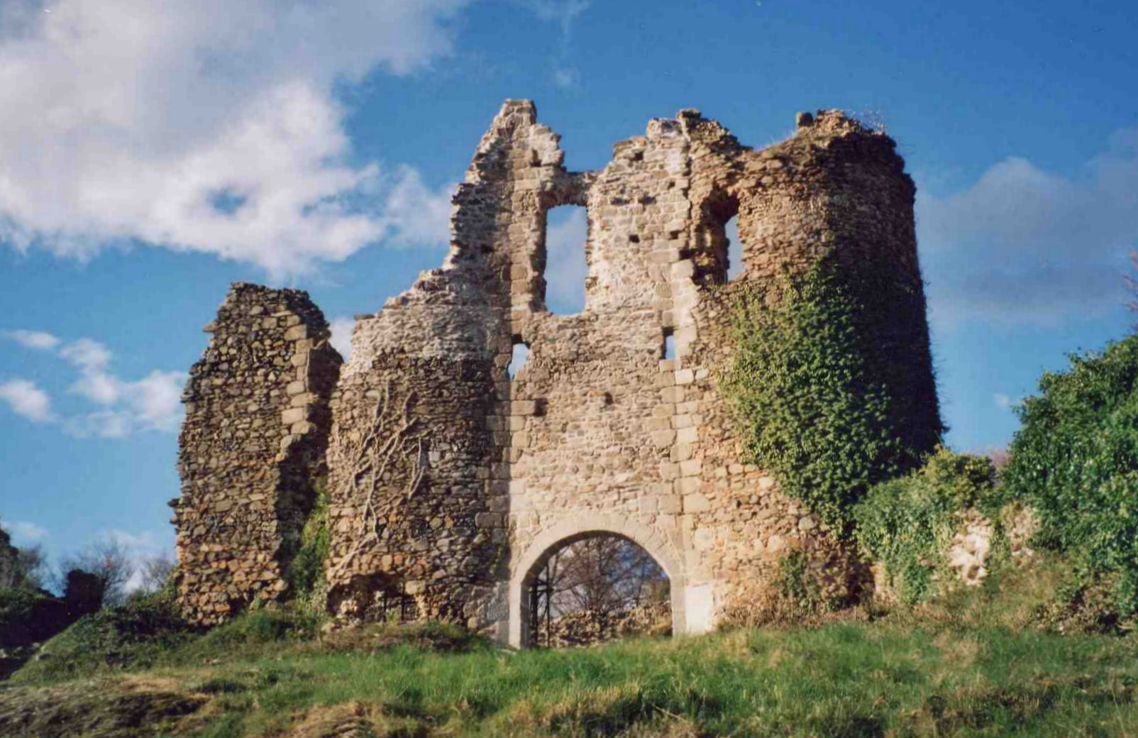 Château de Montgilbert en Auvergne (13e-15e siecle). Vue du châtelet d'accès à la cour haute en 2002.